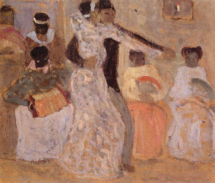 Pedro Figari - El tango (óleo s/cartón) (oil on cardboard) - 33x40cm